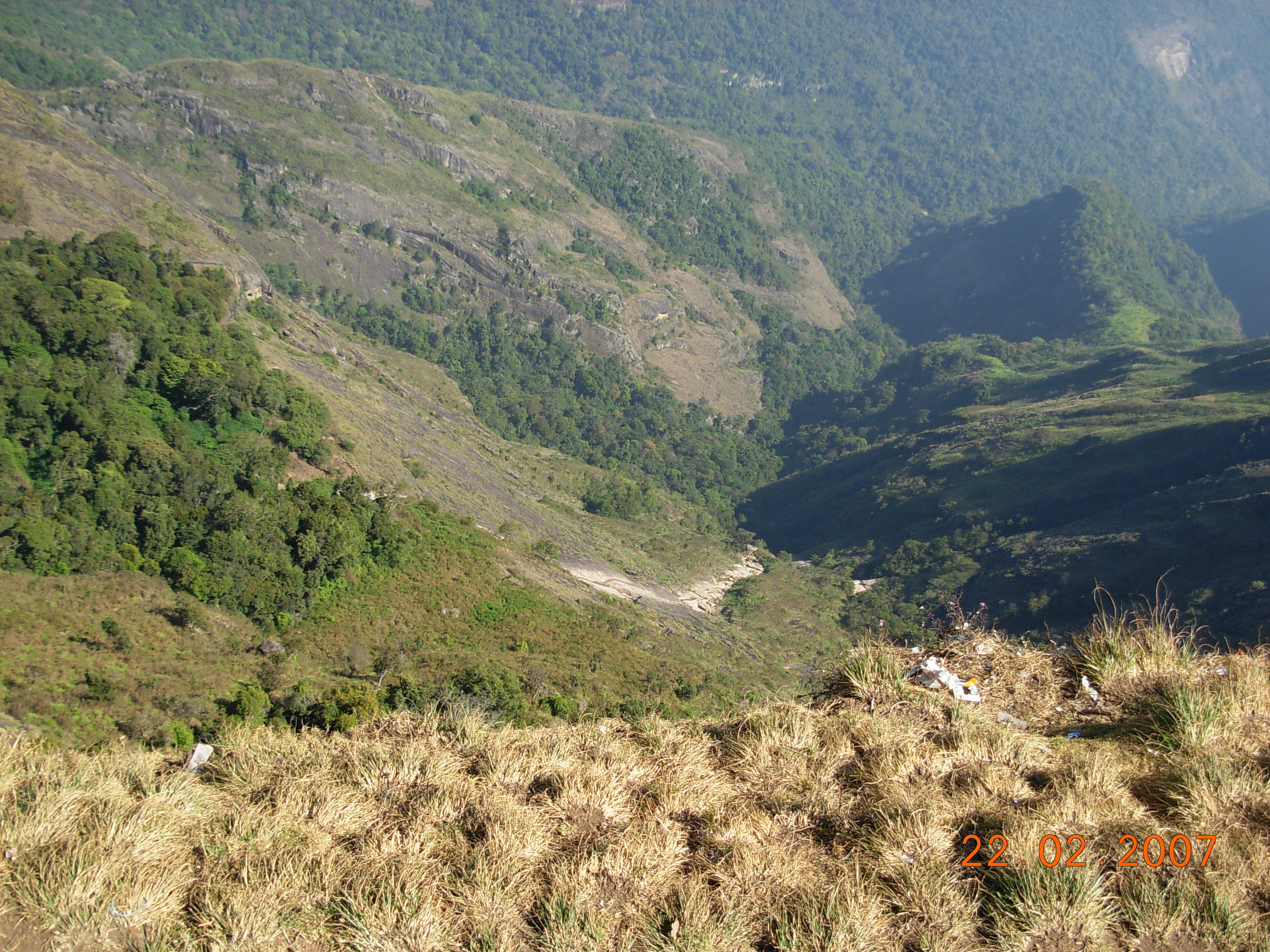 കൊടൈക്കനാലിലെ ആത്മഹത്യാമുനമ്പ്. മിക്കപ്പൊഴും കോടമഞ്ഞ് മൂടിക്കിടക്കുന്ന ഇവിടെ മഞ്ഞ് മാറിയപ്പോൾ എടുത്ത ചിത്രം.